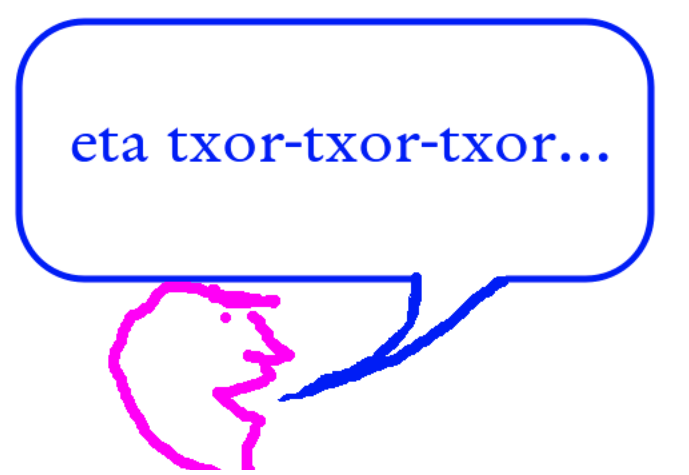 Hitz egitearen onomatopeia.